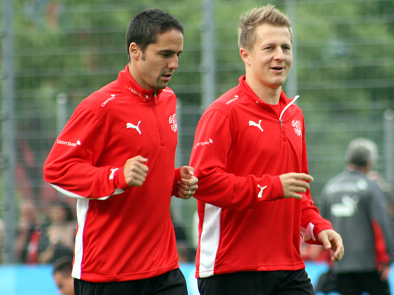 Ricardo Cabanas und Christoph Spycher im Trainingslager der Schweizer Fussballnationalmannschaft vor der Euro 2008